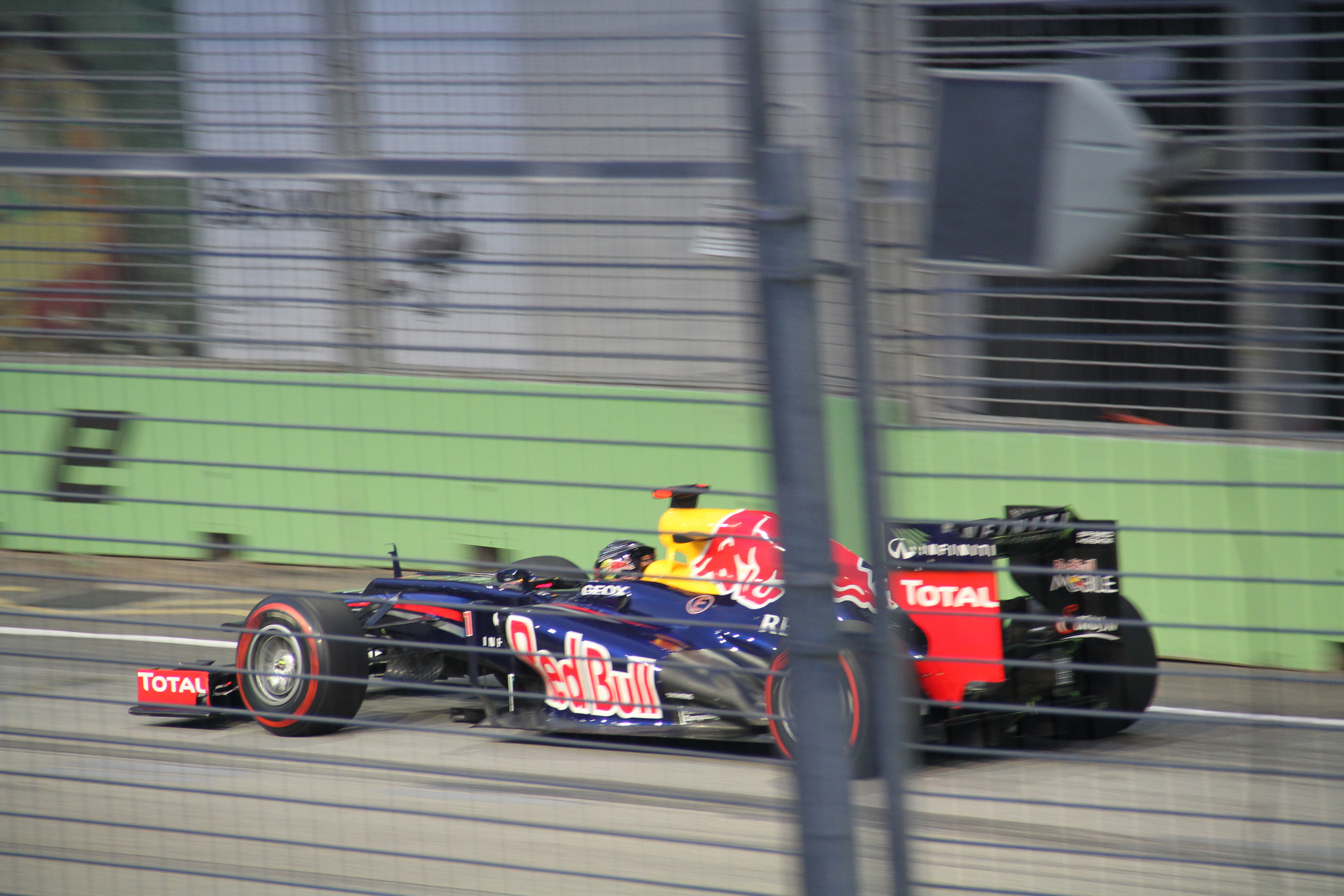 Singapore F1 2012 (DAY 2)